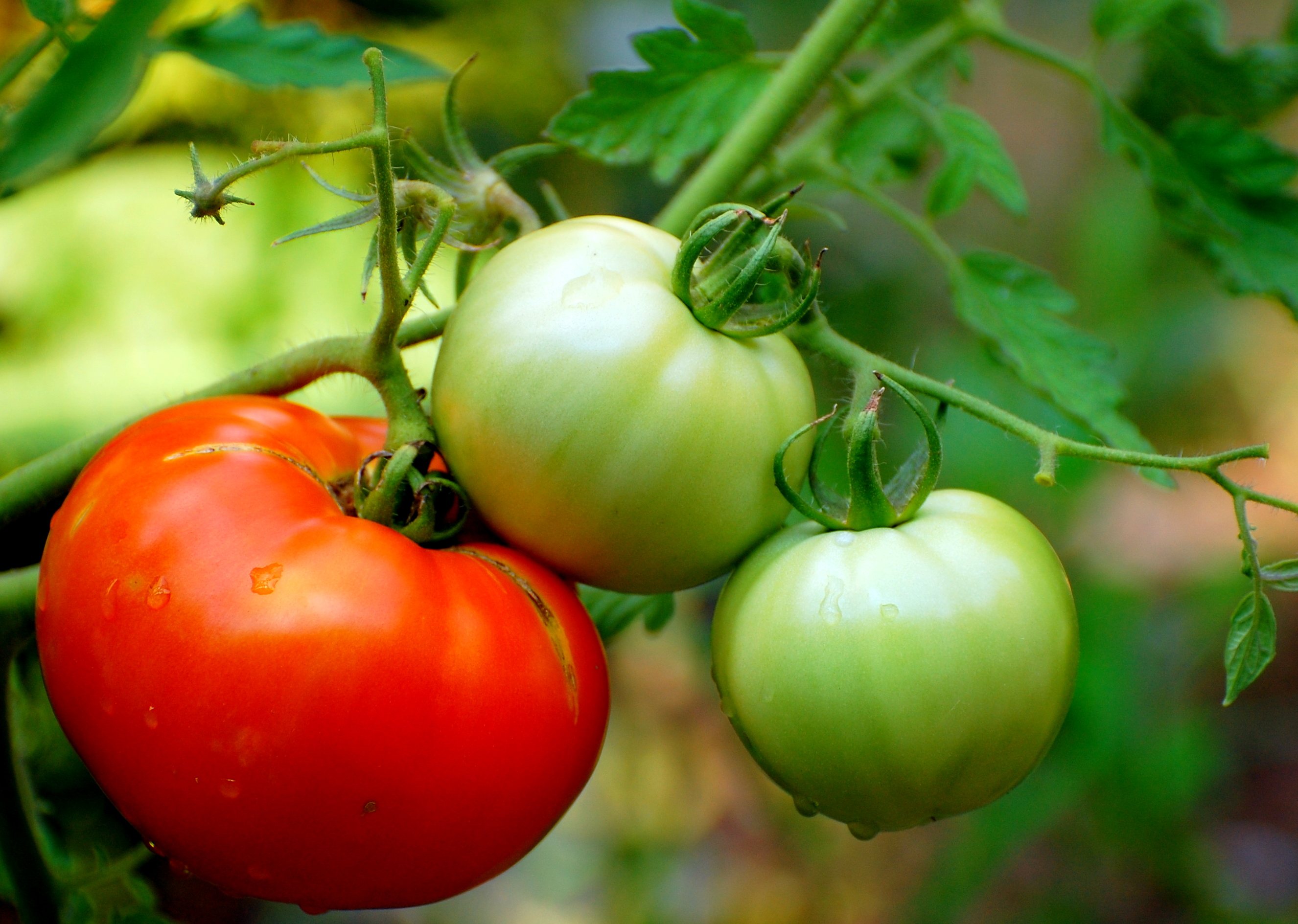 തക്കാളി പഴുത്തതും പച്ചയും